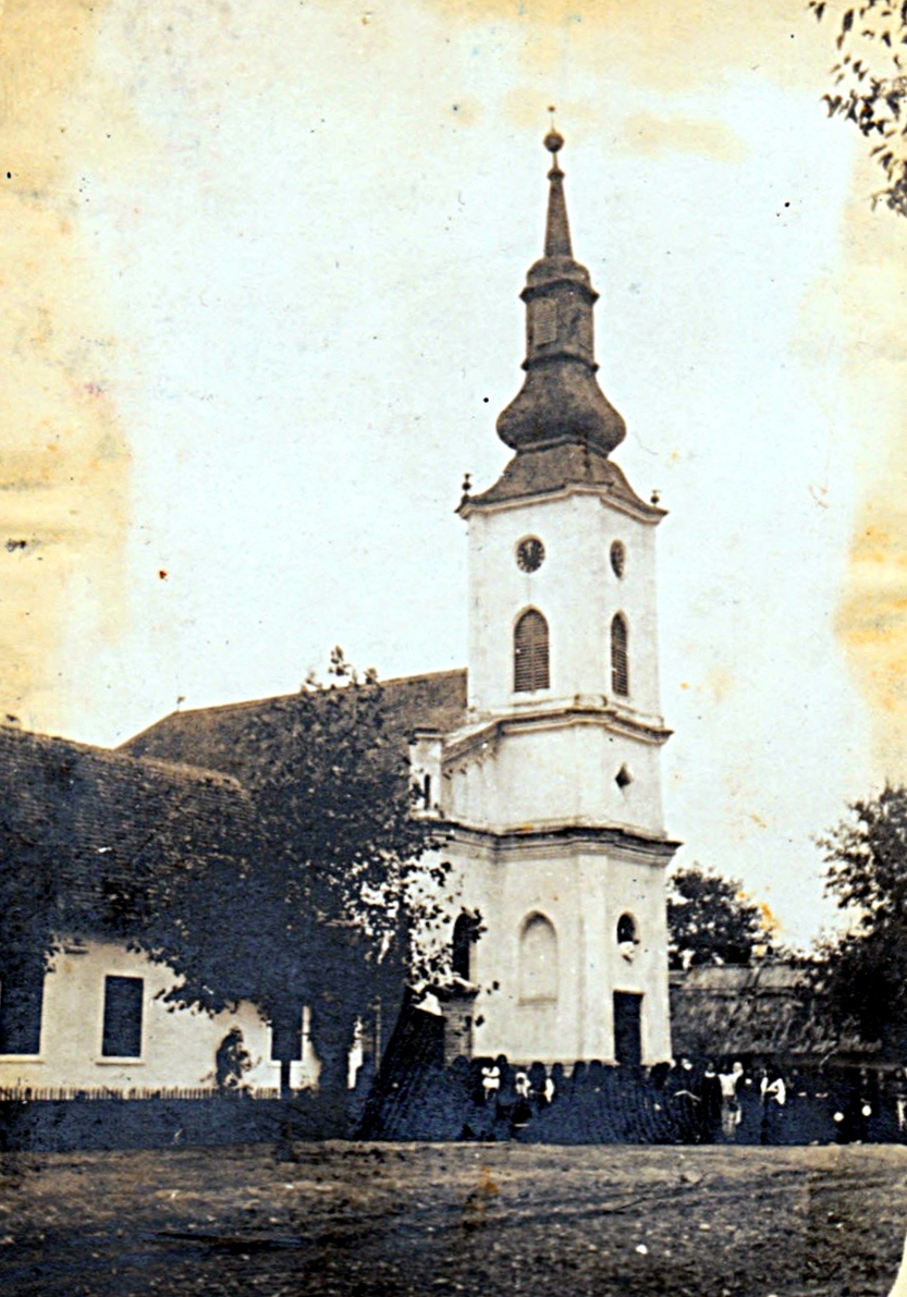 A tordinci református templom Kulifay Elek (1837–1912)idejében.